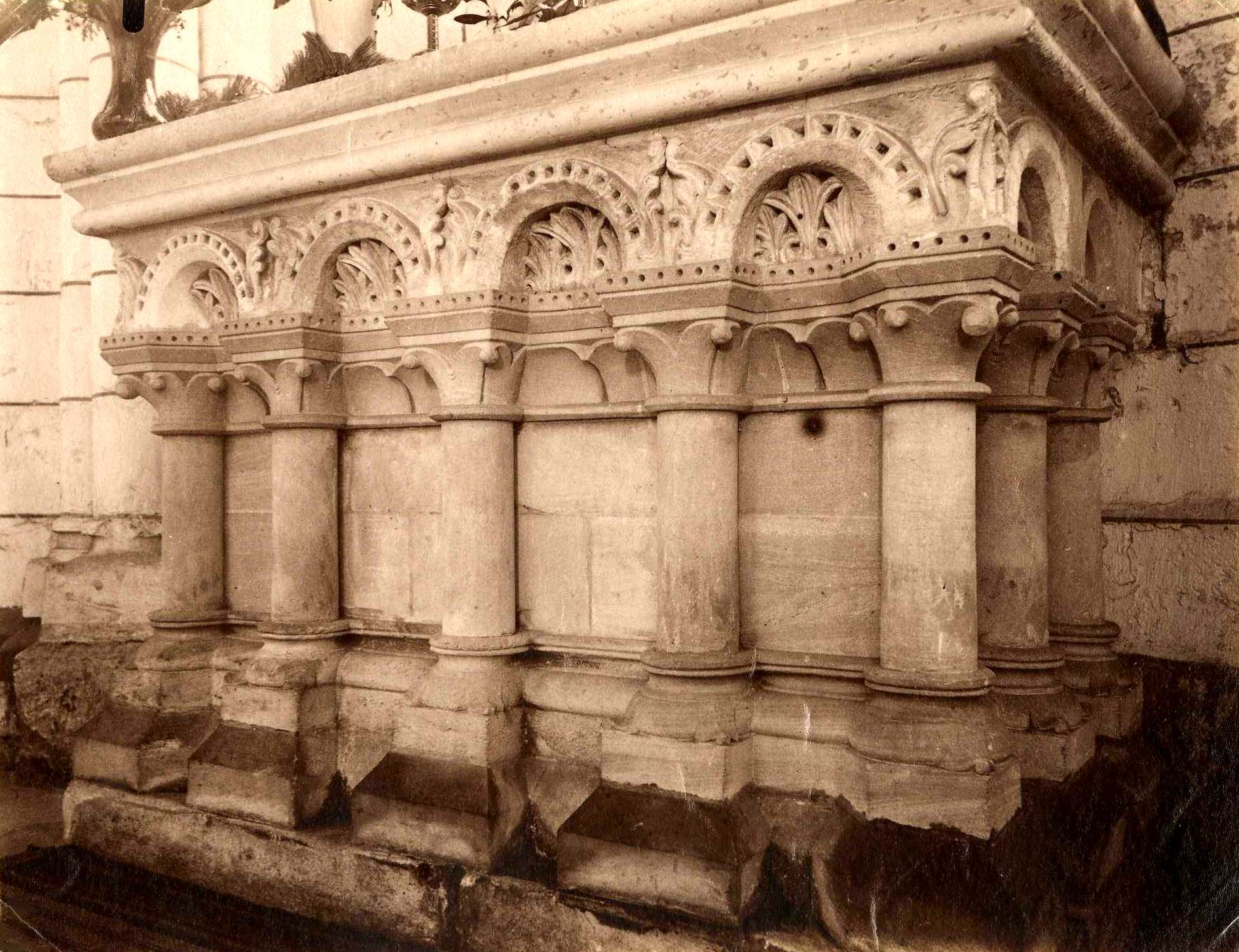 Abbatiale, chapelle rayonnante sud, autel roman à arcatures, vue de la fin du XIXe ou du début XXe siècle.